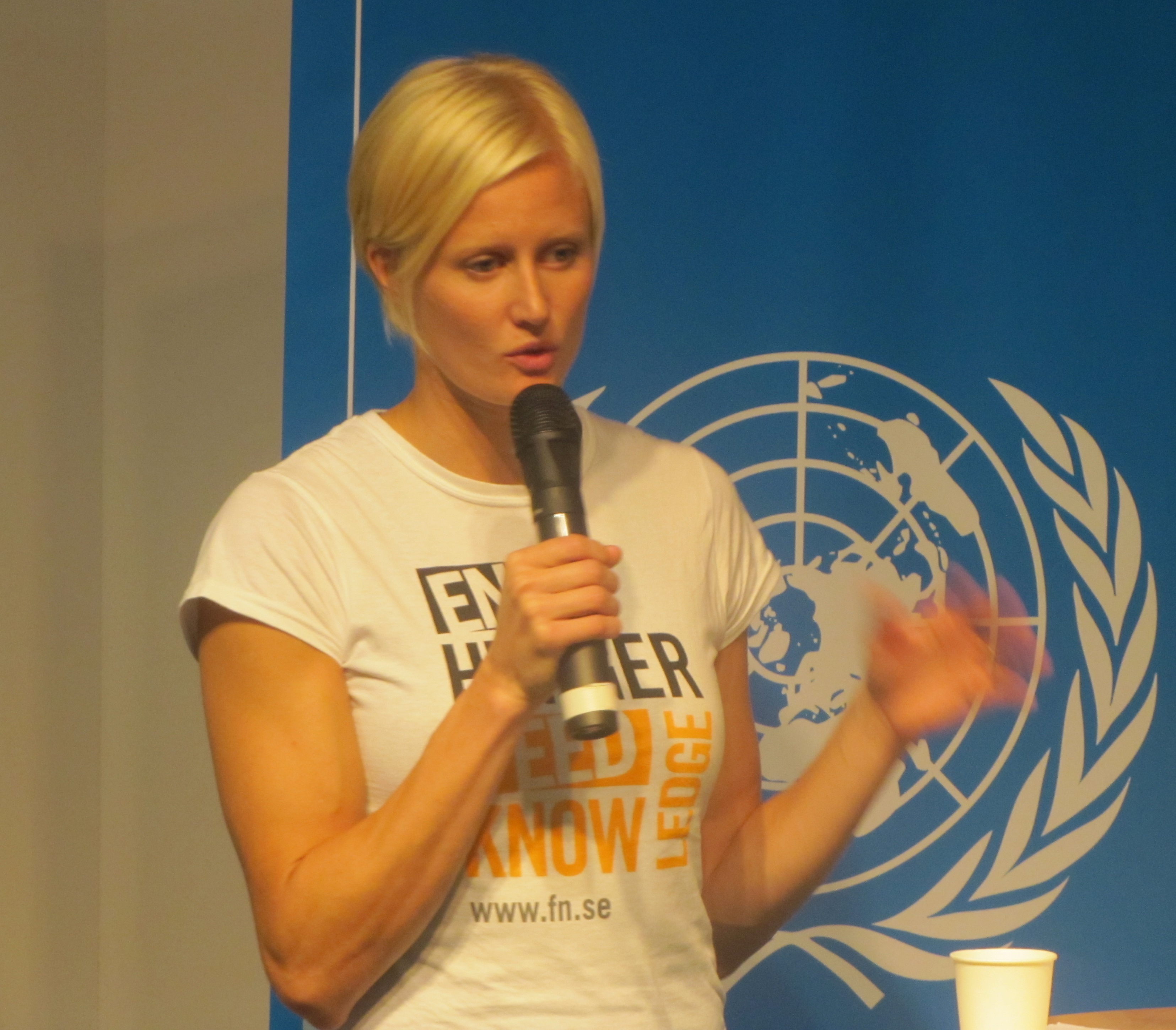 Carolina Klüft, friidrottare och ambassadör för Svenska FN-förbundet.